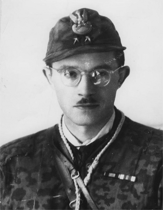 Por. cc Stefan Bałuk ps. "Kubuś" (AK) w mundurze zdobytym na Stawkach w SS-mańskiej bluzie kamuflażowej Tarnschlupfjacke we wzorze "dębowym". Na piersi widoczne baretki Orderu Wojennego Virtuti Militari i Krzyża Walecznych.